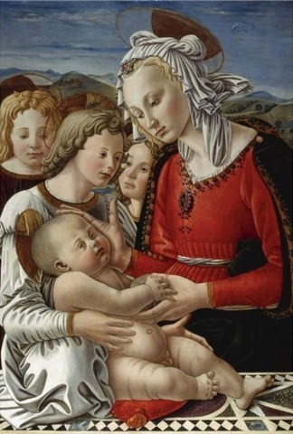 Madonna Benson, Colección privada